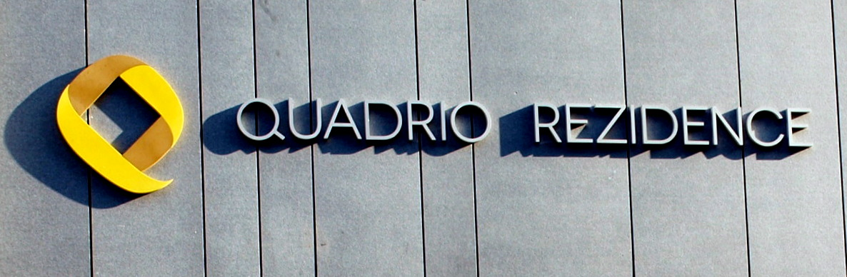 Quadrio Praha